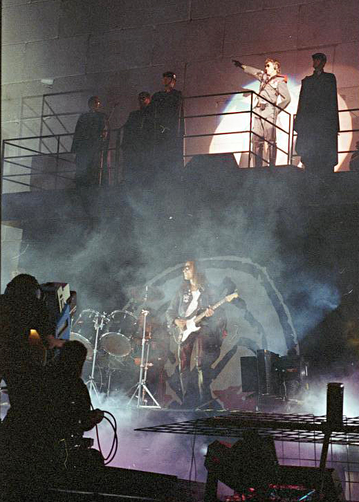 Berlin, Aufführung der Rockoper "The Wall" BER-400 KB/22.7.90/Berlin: Rockspektakel "The Wall"/ Komponist dieses einmaligen Epos über Rock, Raum und Zeit ist Roger Waters (oben). Einst Mitbegründer von Pink Floyd inszenierte er seine 1979 geschaffene Rockoper zum voraussichtlich letzten Mal als Auftakt für den neu geschaffenen Memorial Fund for Disaster Relief (Stiftung für Katastrophenopfer). [Berlin, Potsdamer Platz.- Aufführung der Rockoper "The Wall" auf dem ehemaligen Todesstreifen]